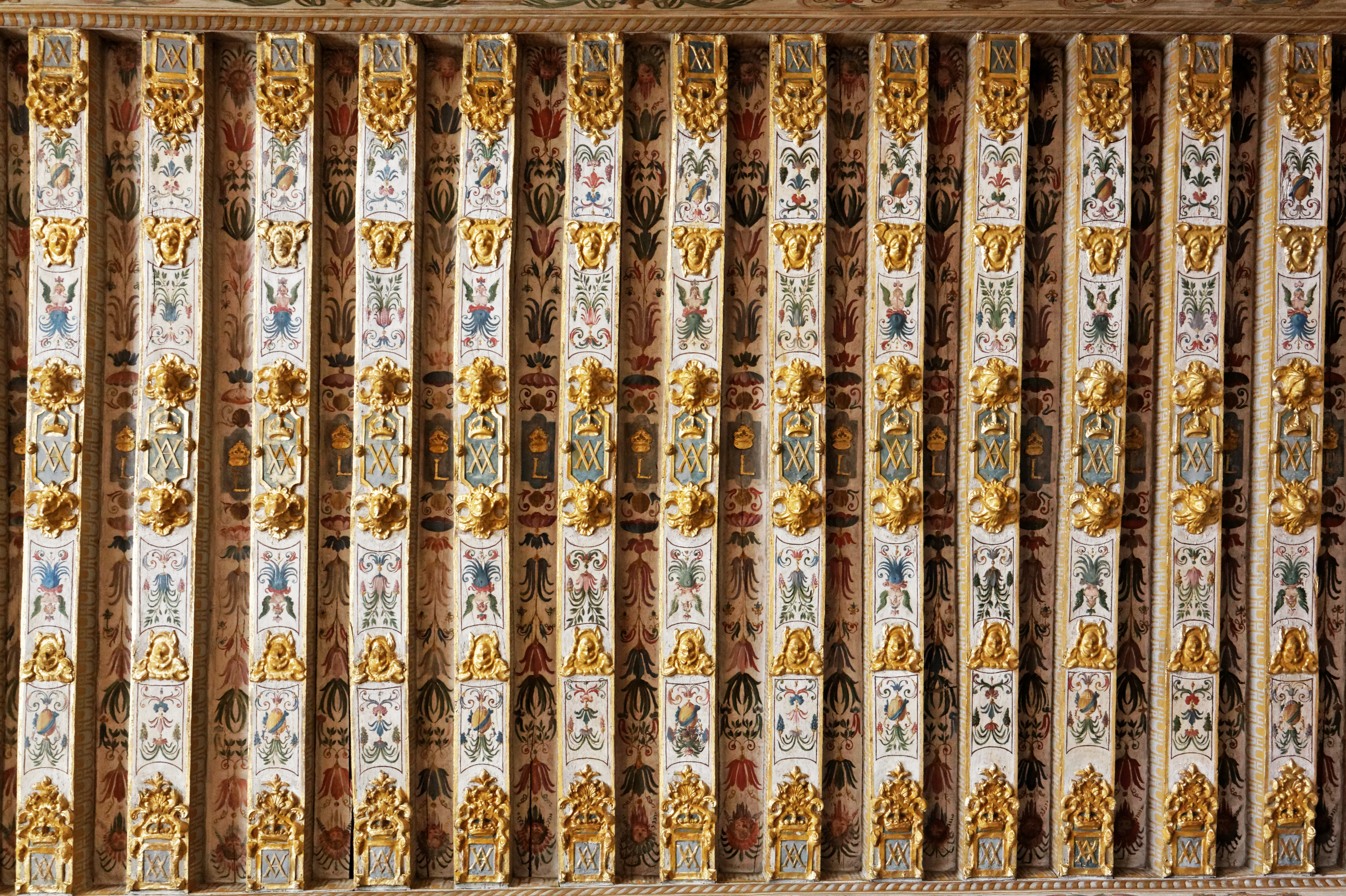 Vue de l'intérieur du château de Fontainebleau.